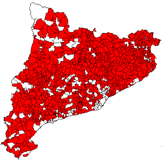 Mapa municipal del Principat de Catalunya on figuren en vermell els municipis adherits a l'AMI.